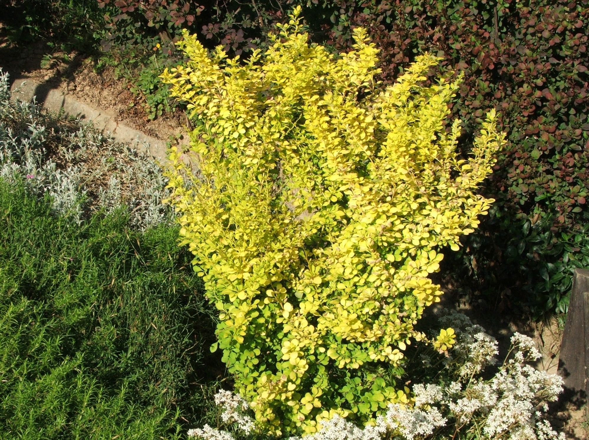 Berberis Thunbergii var. "Aurea" Berberys Thunberga, var. "Aurea" Autor: Opioła Jerzy Data: 04-03-2006